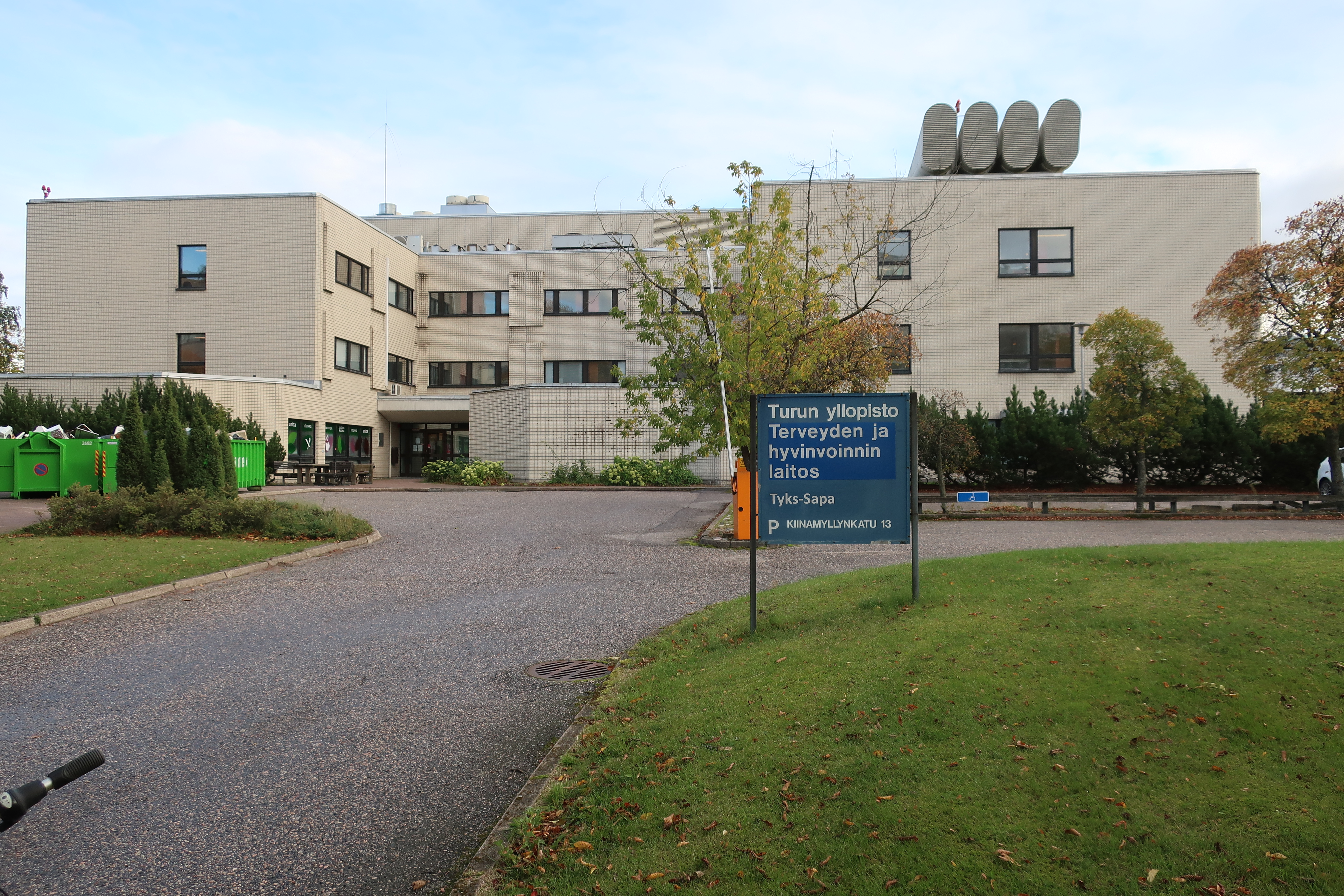 Turun Yliopiston syksyllä 2018 purettava laitosrakennus Mikro kuvattuna Kiinamyllynkadun puolelta.